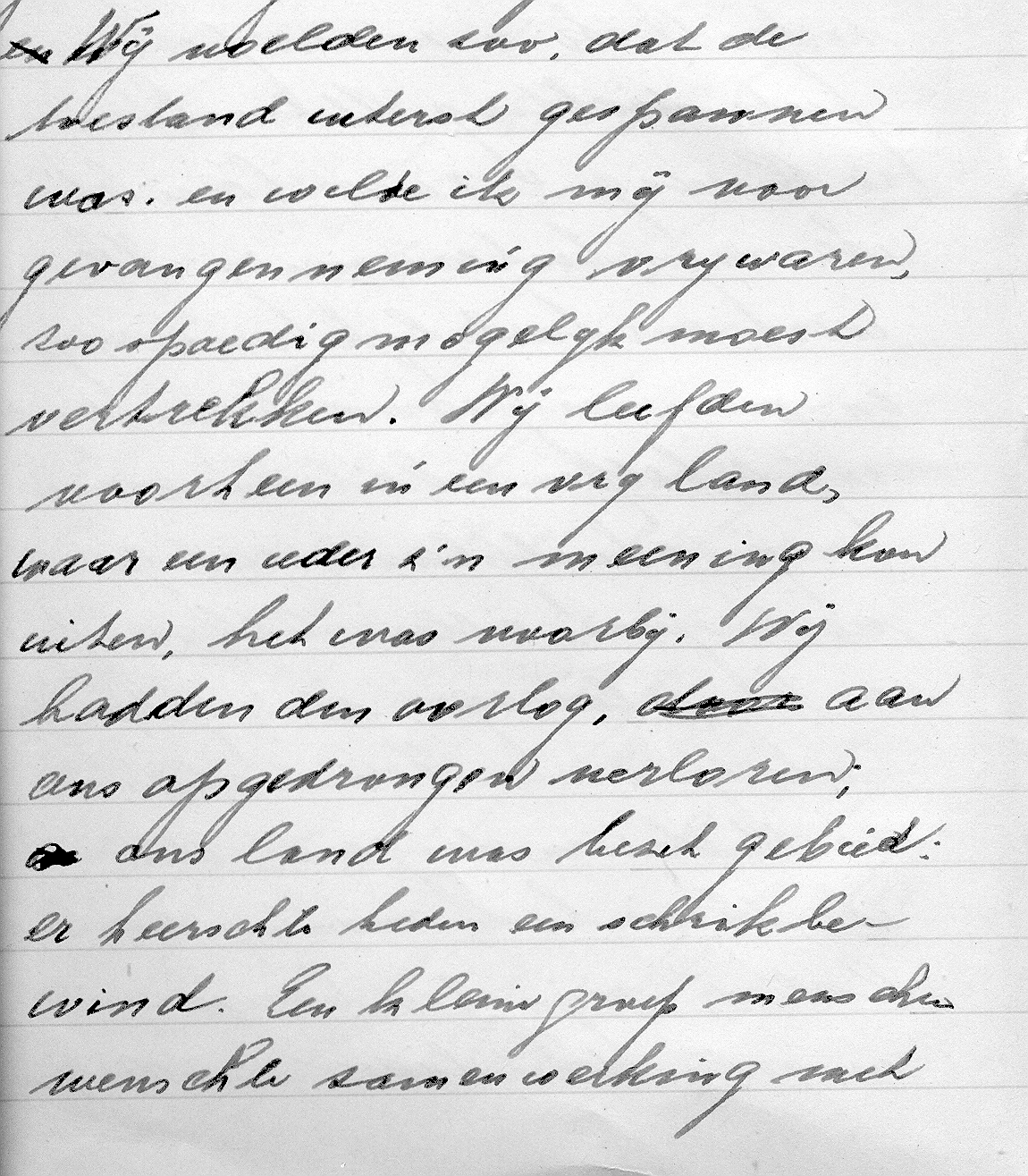 Bladzijde 3 uit het dagboekje van P.C. Kroon dat hij bijhield tijdens zijn onderduikingsperiode.